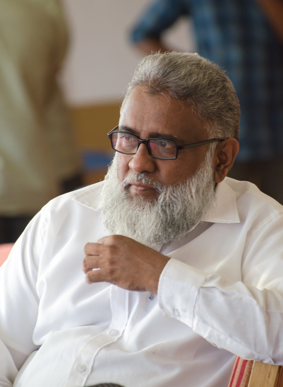 എം.ഐ. അബ്ദുൽ അസീസ്